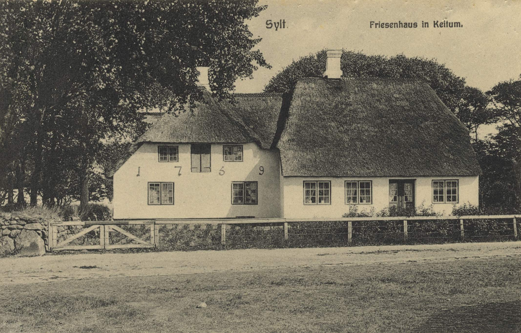 Friesenhaus in Keitum